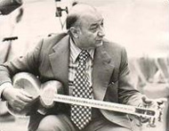 Maestro Jalil Shahnaz playing tar.